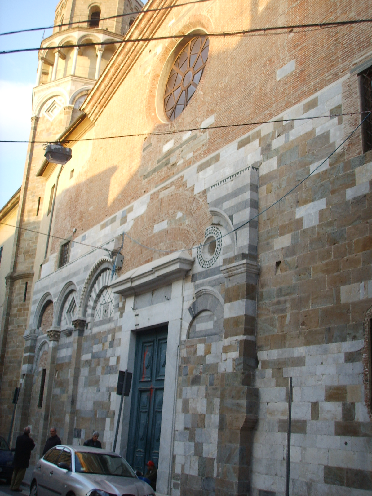 Chiesa_di_san_nicola,_campanile